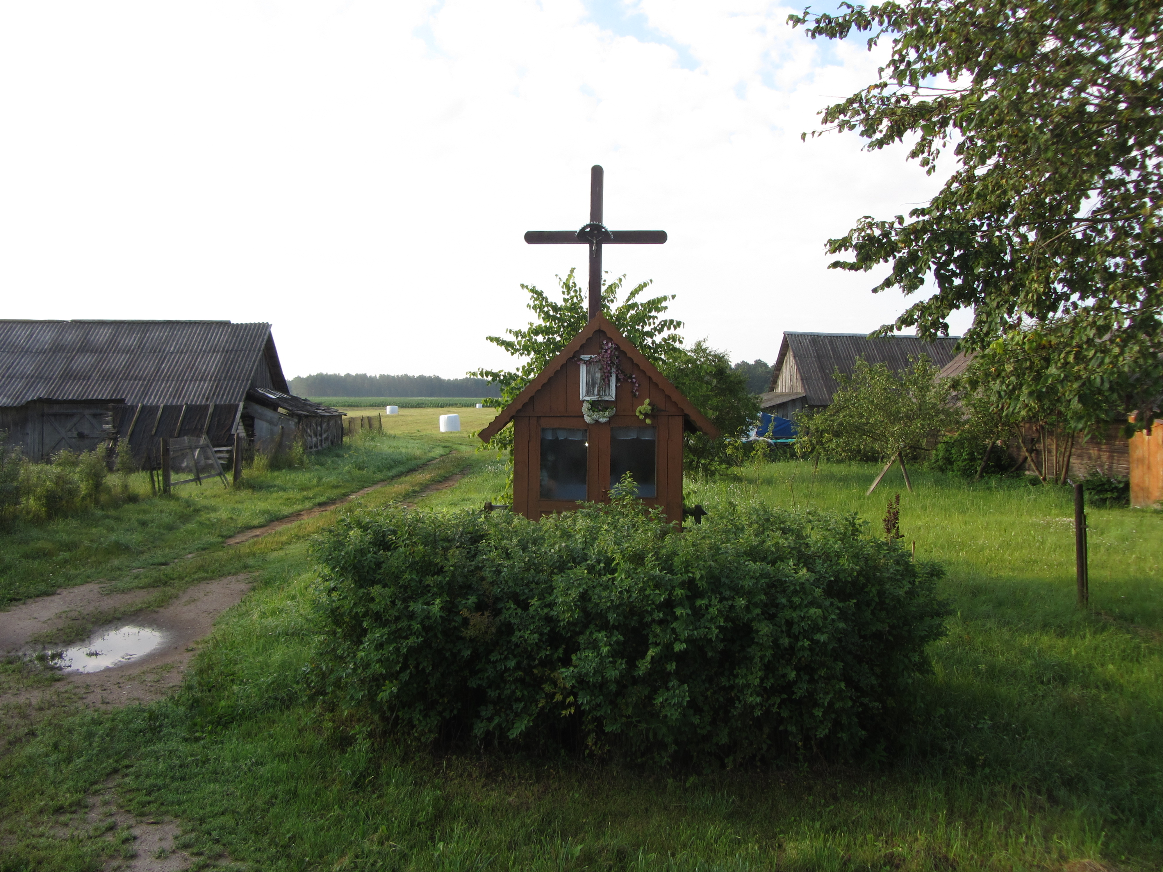 Mamavys 21169, Lithuania